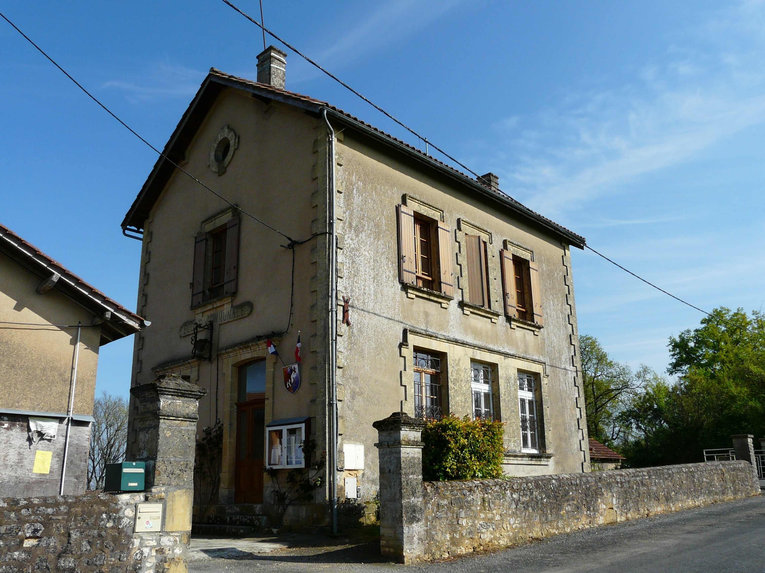 La mairie de Cladech, Dordogne, France. Ancienne école communale.